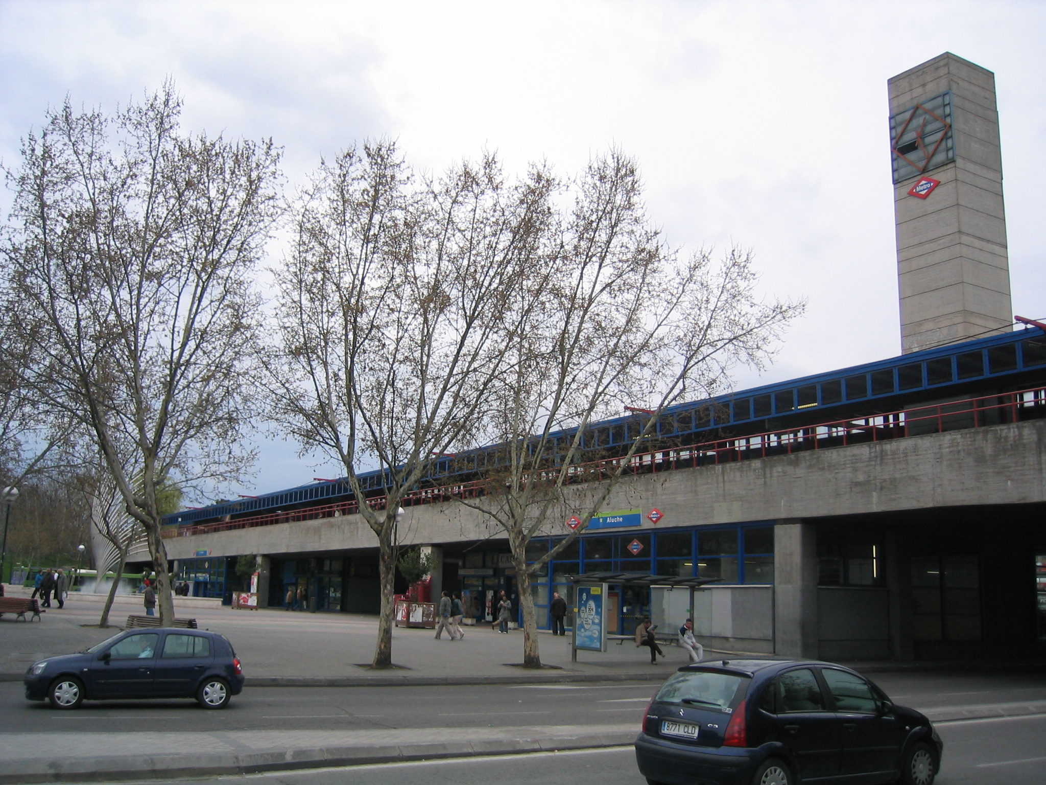 Intercambiador de Aluche, en el distrito de Latina (Madrid).